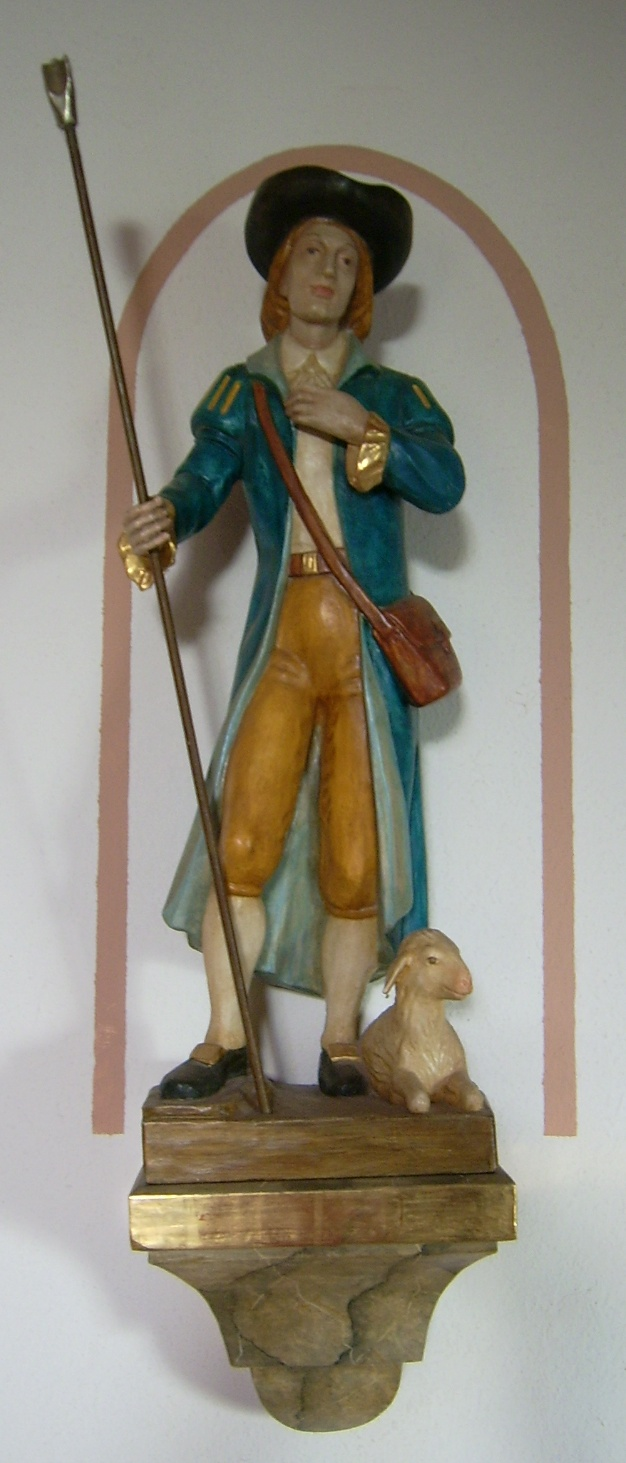 Der hl. Wendelin als Schäfer auf dem Wendalinushof